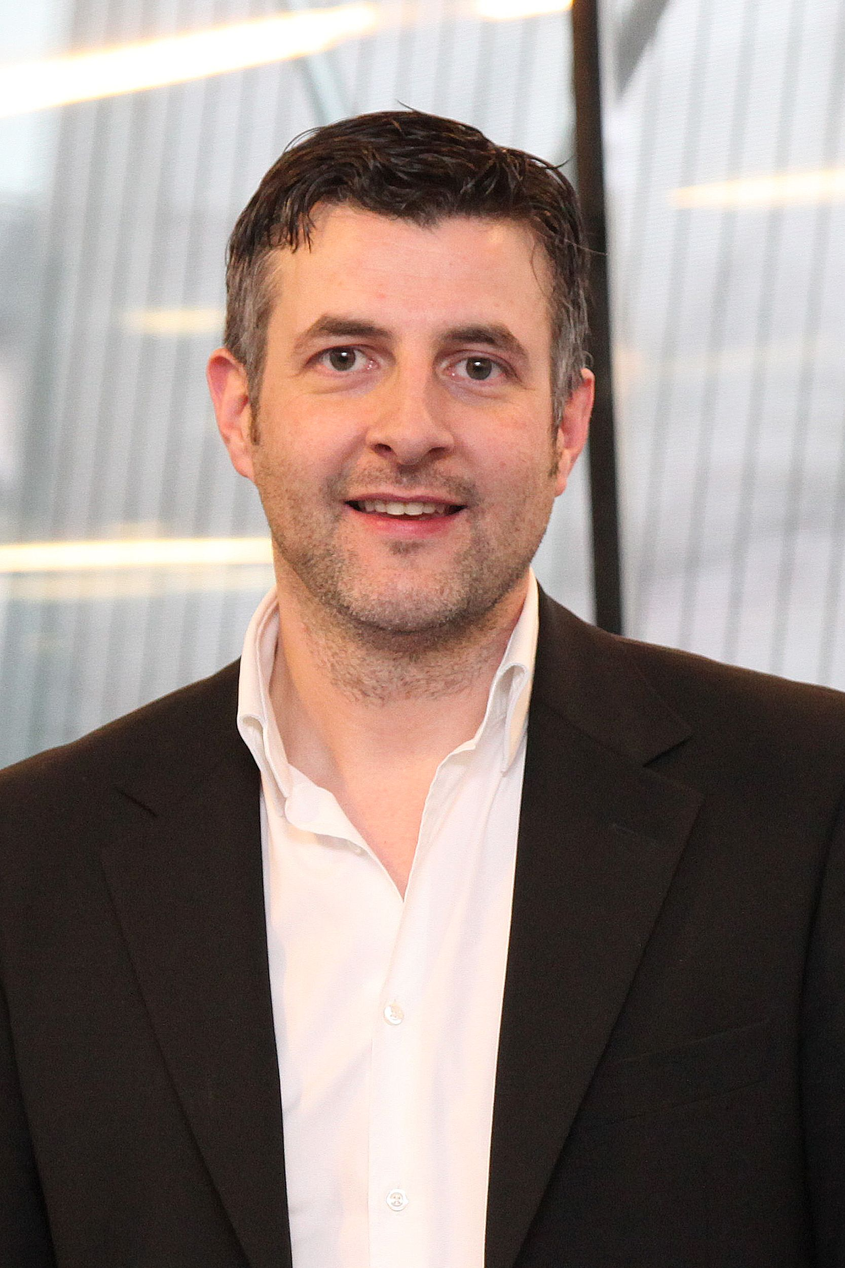 Pascal Arimont